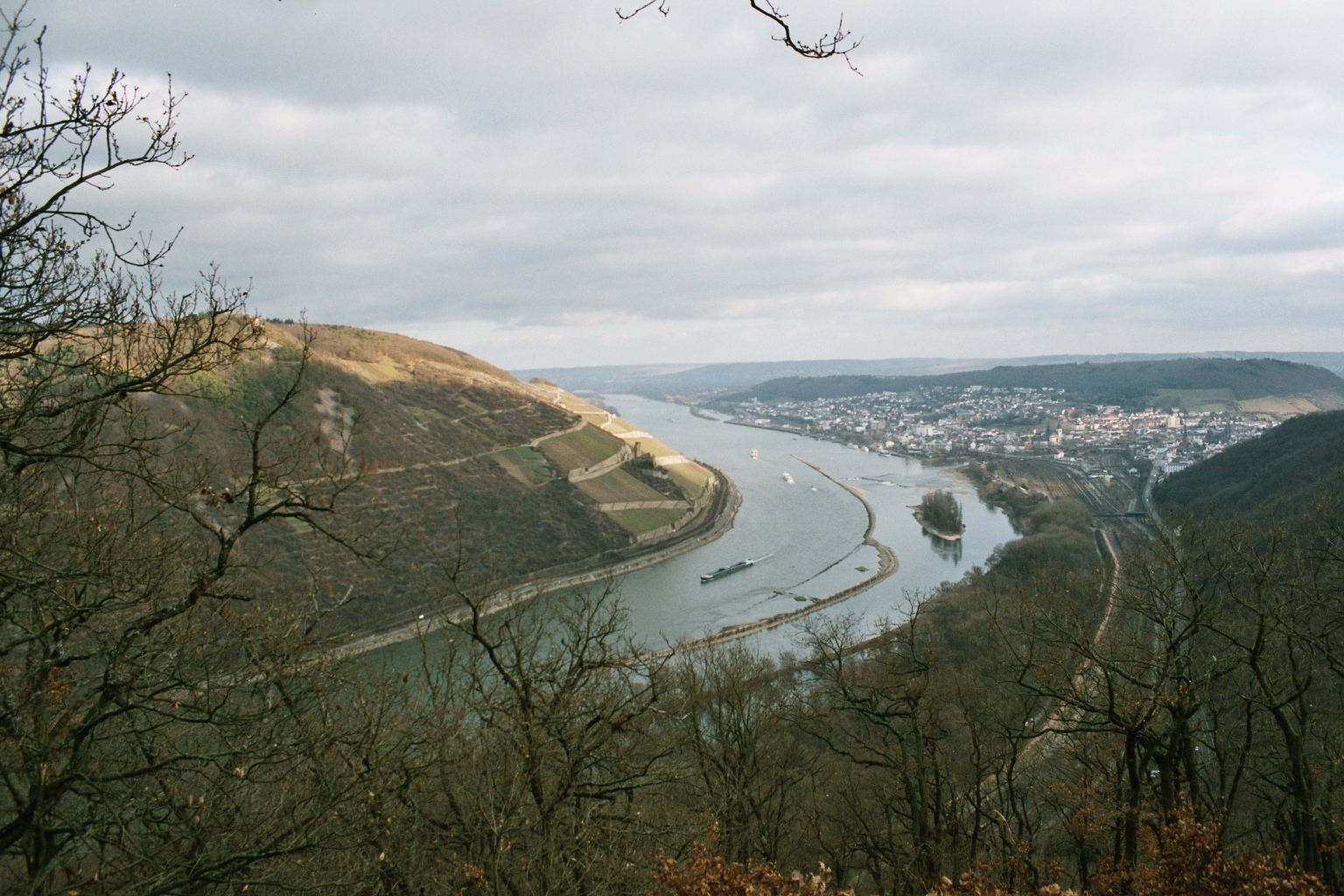 Verbuschte Weinbergsterrassen bei Bingen